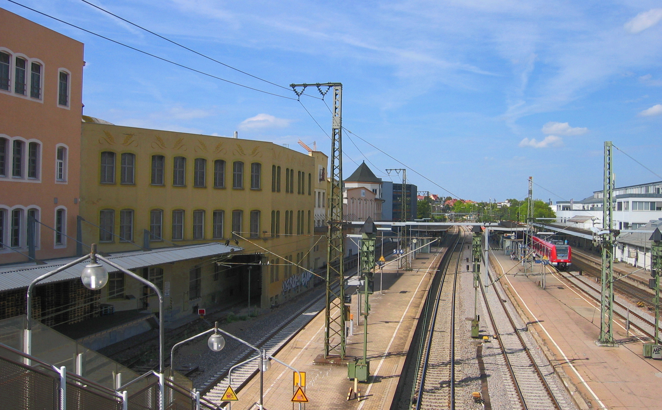 Bahnhof Ludwigsburg und Caro-Kaffee-Fabrik 100 Jahre später (Jahr 2015)